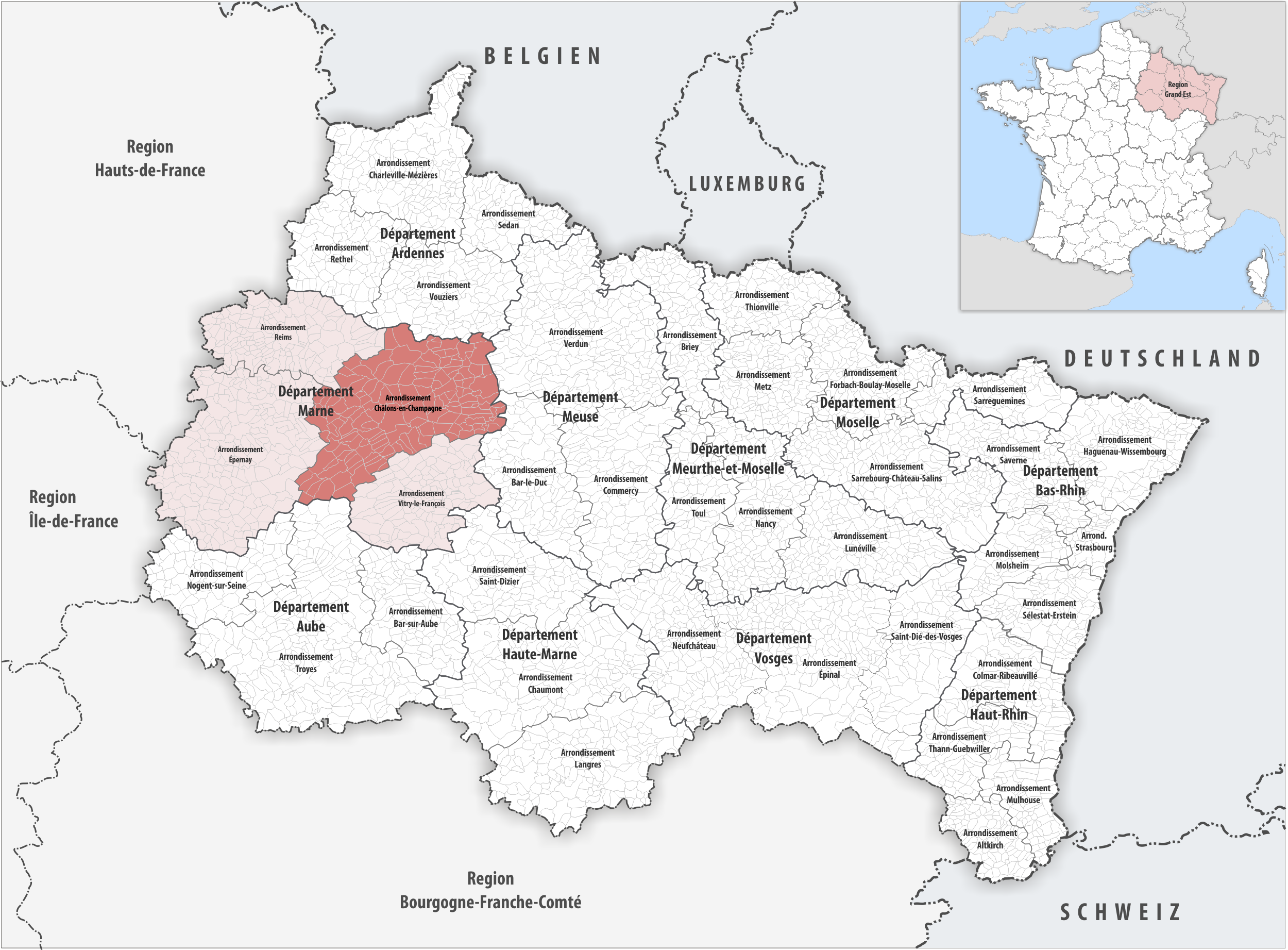 Lage des Arrondissements Châlons-en-Champagne